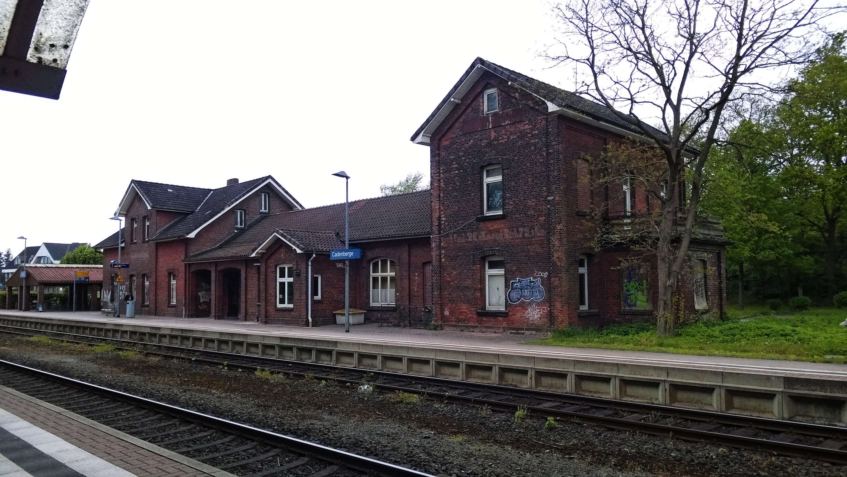 Cadenberge 2015 Bahnhof